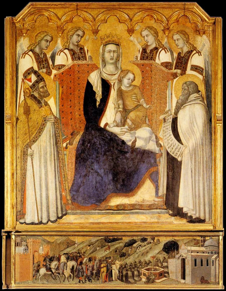 Madonna_with_Child by Pietro Lorenzetti, Siena, Pinacoteca. Pietro Lorenzetti, Madonna col bambino, san Nicola di Bari, Elia e angeli (1329). Chiesa del carmine, Siena, 171x161cm